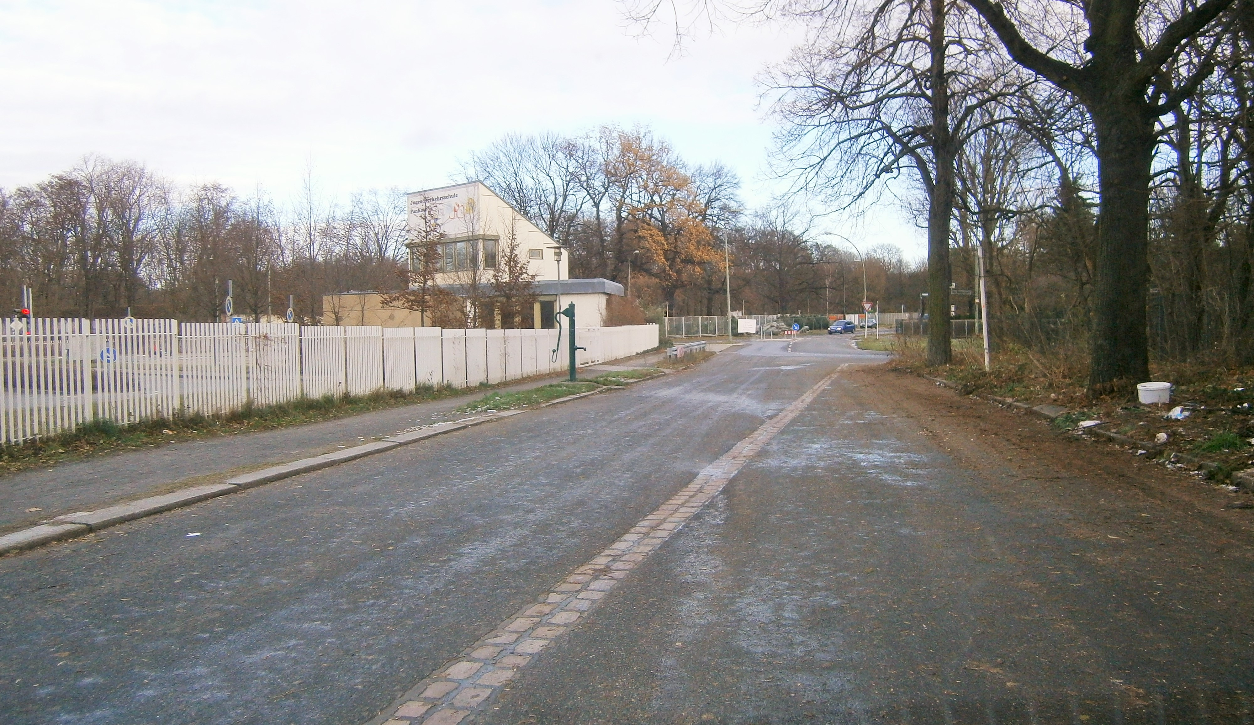 Schützenstraße ist eine Straße in Berlin-Niederschönhausen. Hier Ecke Buddestraße Blickrichtung Nord